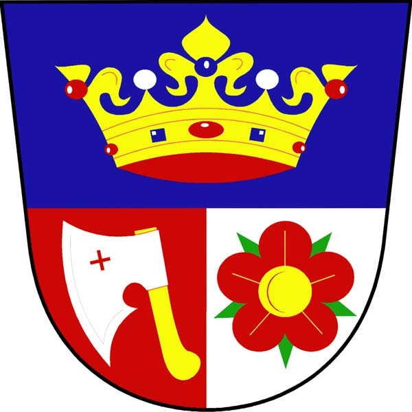 Znak obce Kájov